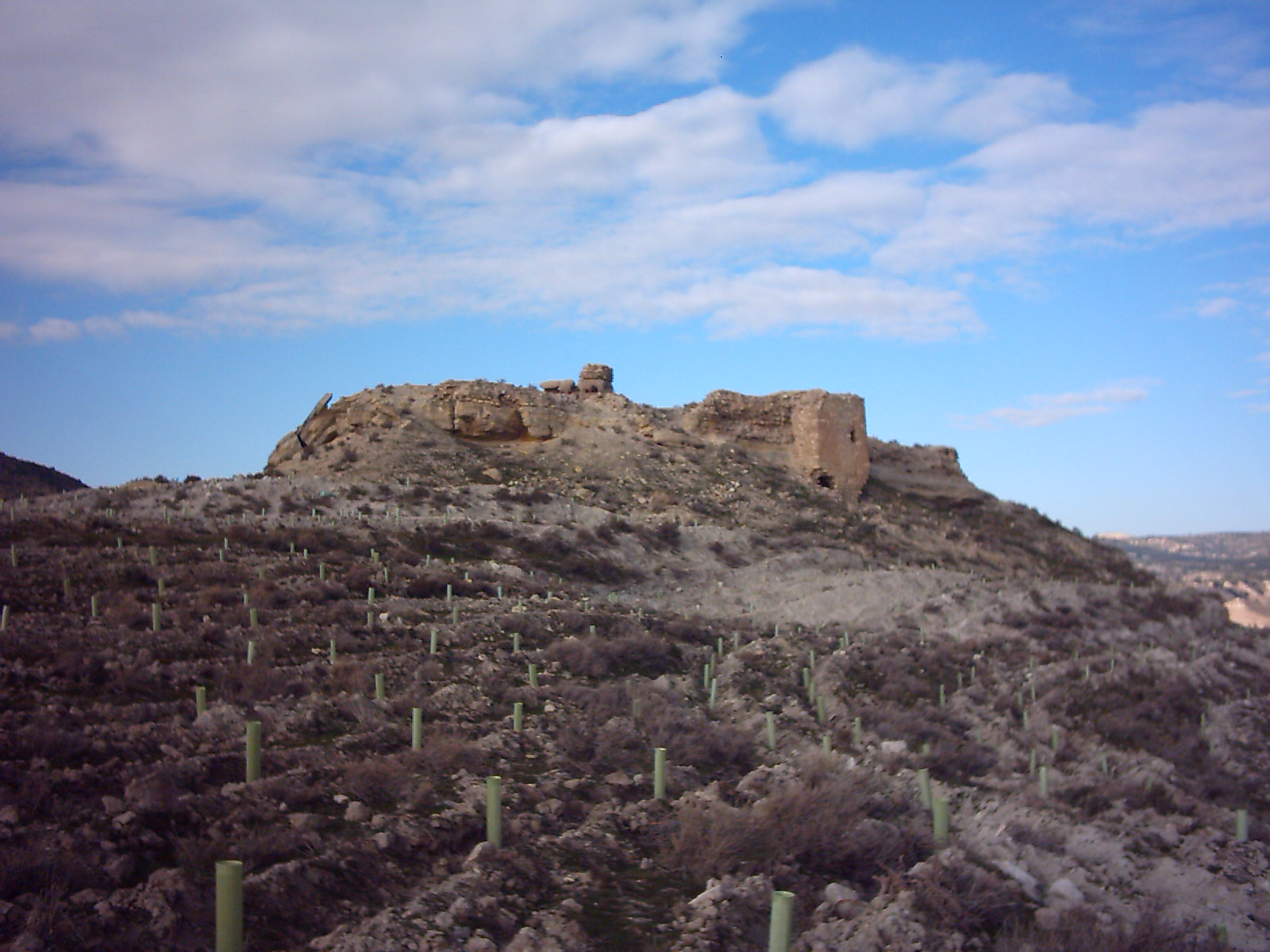 Ruinas del Castillo de Benzalema en el entorno del Embalse del Negratín, dentro del término municipal de Baza (Granada).